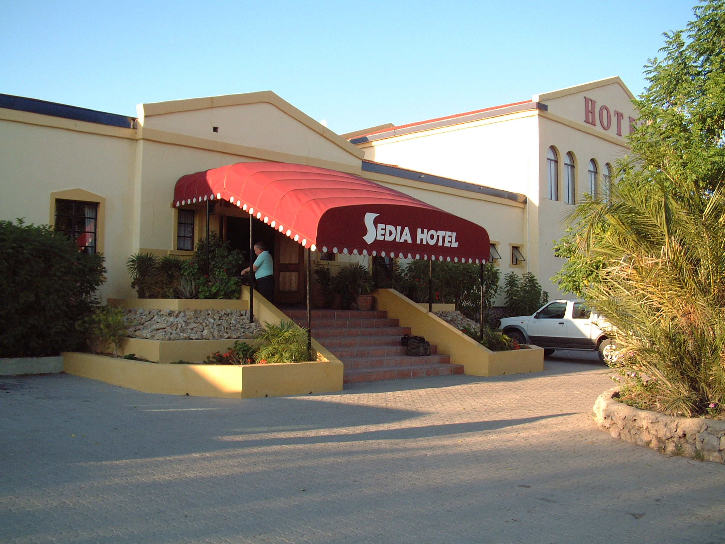 Stadt Maun.